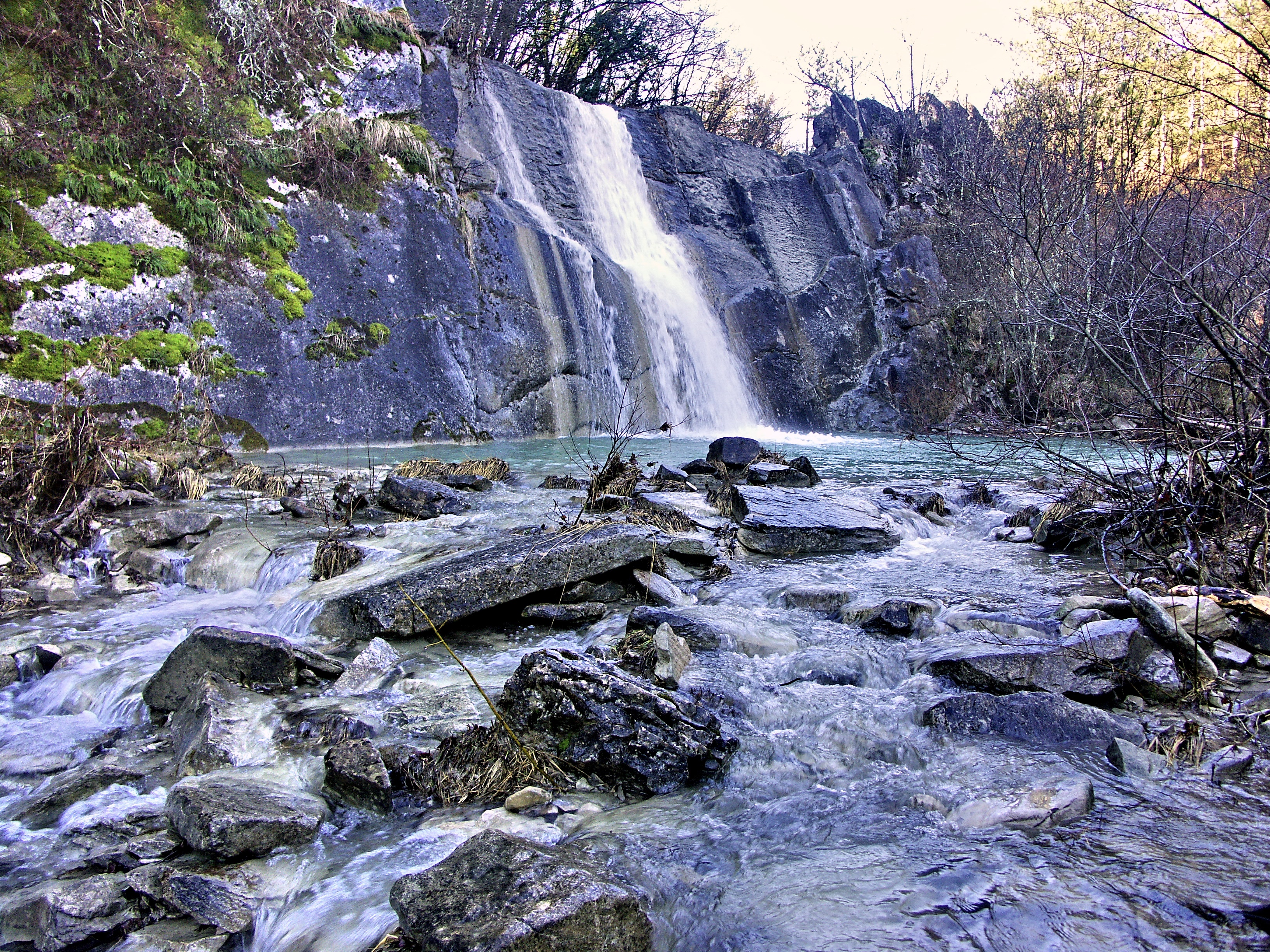 Slap Veli vir pod Peraji